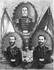 Obra da coleção Brasiliana Iconográfica.